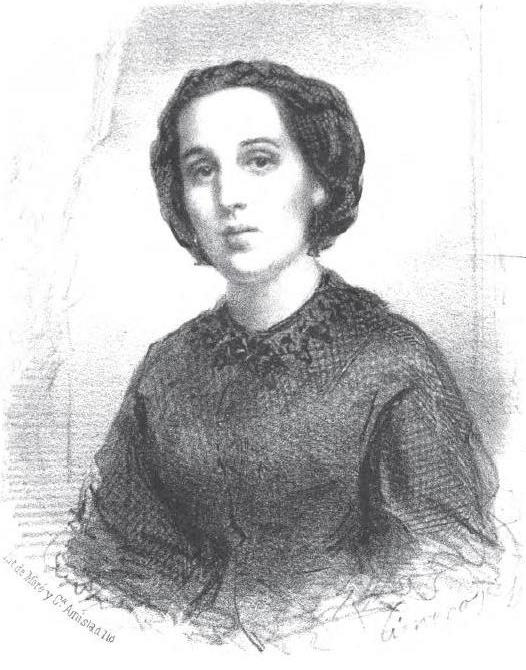 Luisa Pérez de Zambrana, poetisa cubana